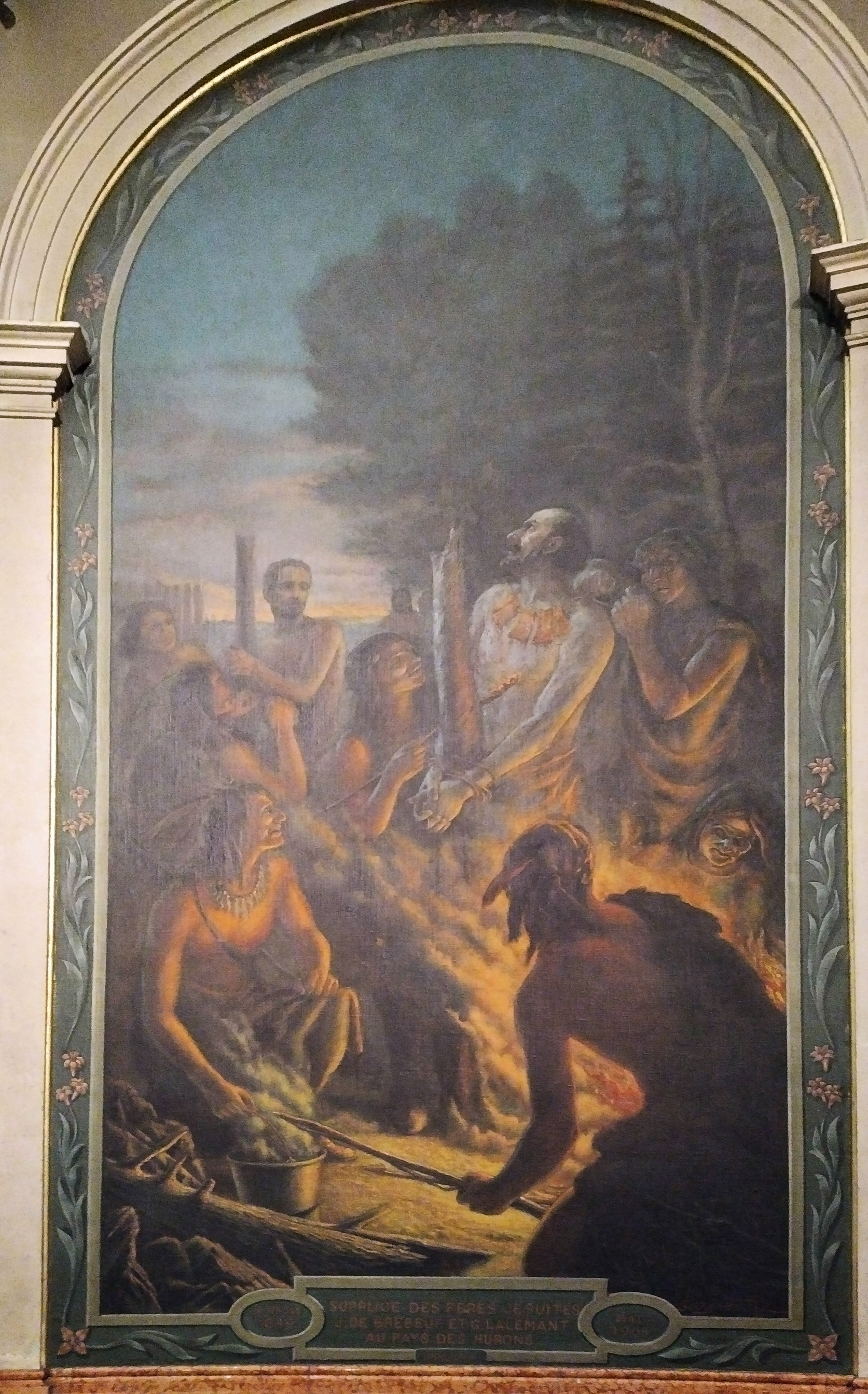 On est au pays des Hurons qui tourmentent les missionnaires jésuites, dont le Père Jean de Brébeuf, vu ici, les mains attachées à un poteau.